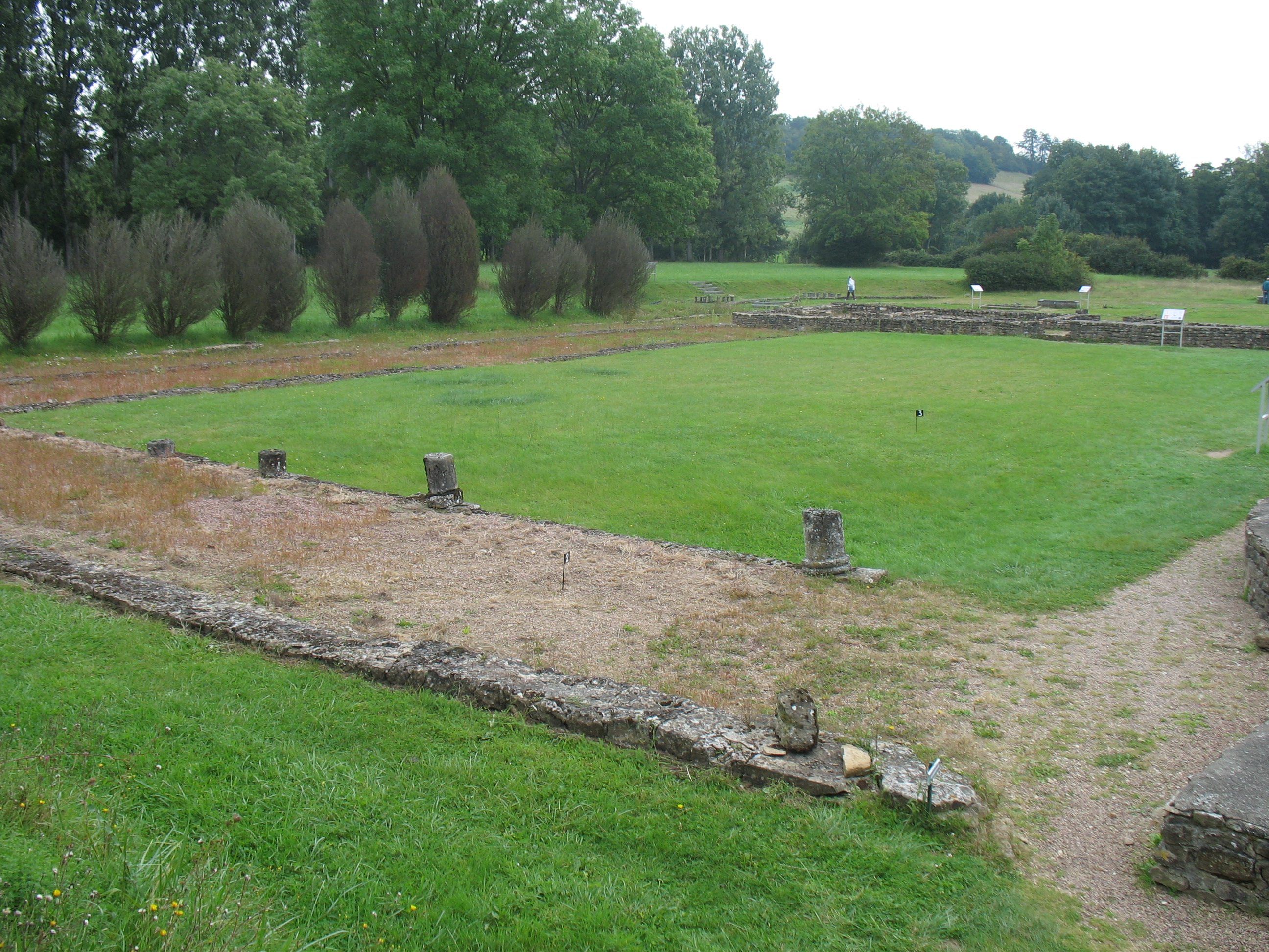 Le site archéologique des Fontaines salées, à cheval entre Foissy-lès-Vézelay et le sud de la commune de Saint-Père, Yonne, Bourgogne, France. La palestre des thermes. Vue vers le sud-est. La rivière Cure coule à 70 m à gauche du photographe et derrière les grands arbres à mi-plan sur la gauche.